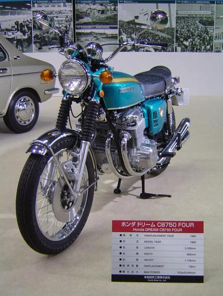 HONDA DREAM CB750 FOUR ホンダ・ドリームCB750FOUR